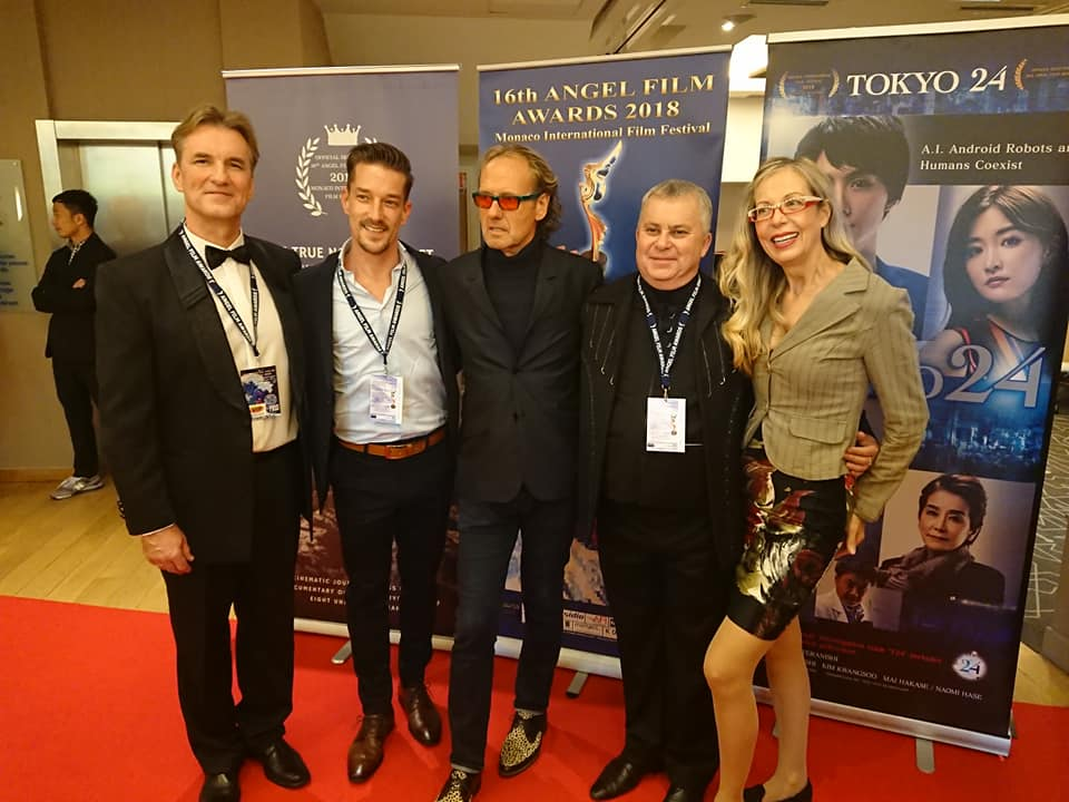 A Megszállottak alkotói az ecuadori San Antonio Nemzetközi Filmfesztiválon (Dino R. Bentley és Rosana Golden, a Monaco International Film Festival igazgatói a két főszereplő – Szabó Máté és Lux Ádám, valamint a rendező – Pozsgai Zsolt – társaságában a díjátadó után)